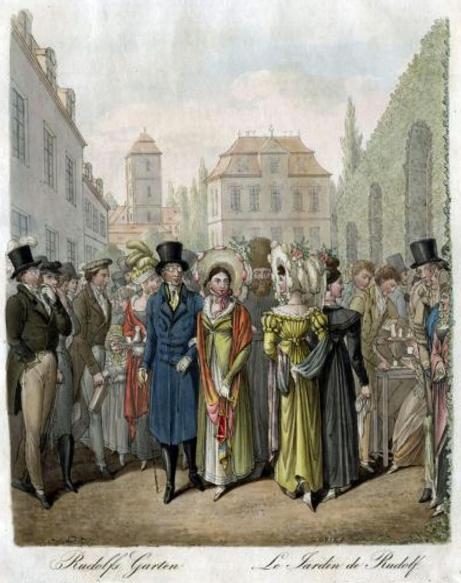 Im Rudolphschen Garten in Leipzig